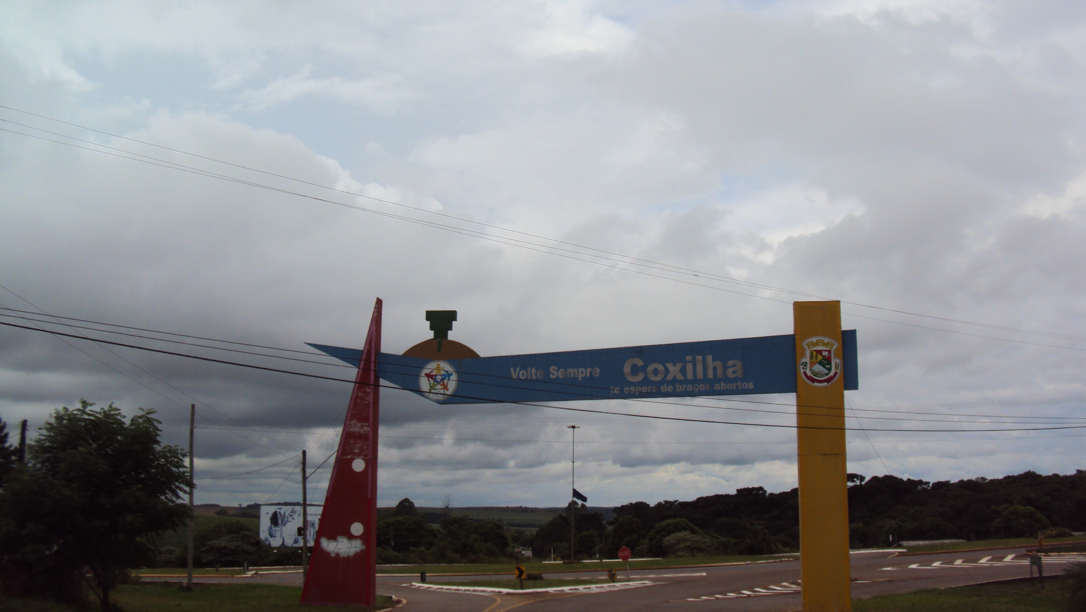 Portal na entrada da cidade